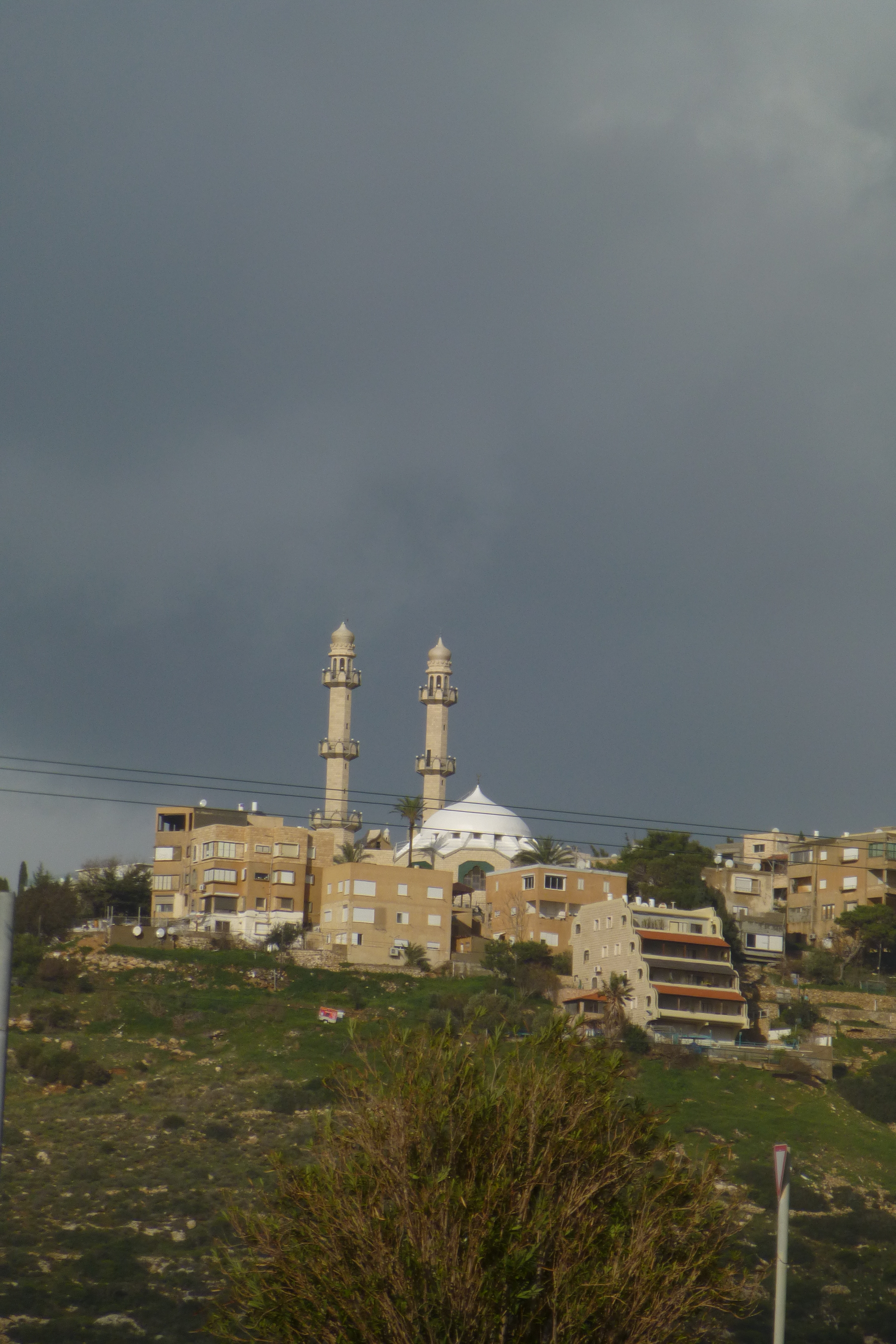 מסגד סיידנא מחמוד בשכונת כבביר בחיפה. מסגד זה משתייך לפלג האחמדים שנוסד בהודו ומטיף לנאורות, שלום ואהבה לאחר.